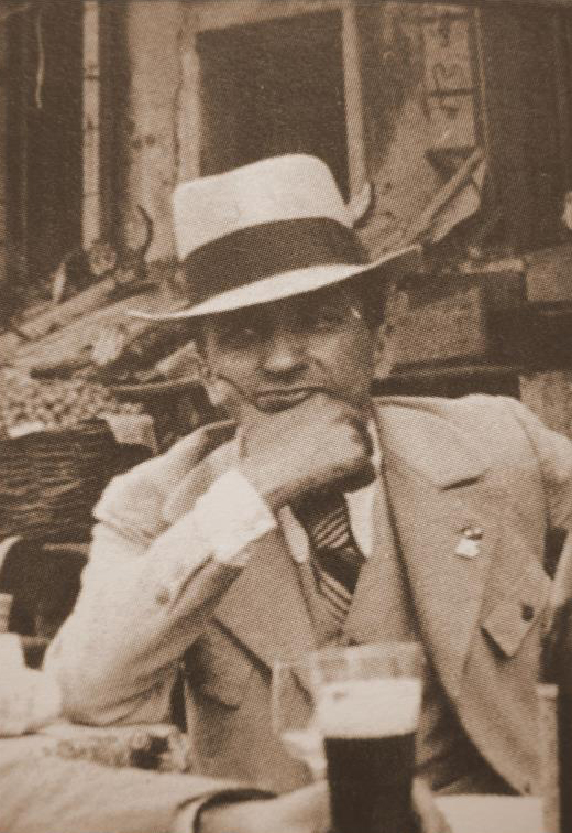 Ritratto fotografico del pittore Angelo Zamboni (Verona, 1895-1939)